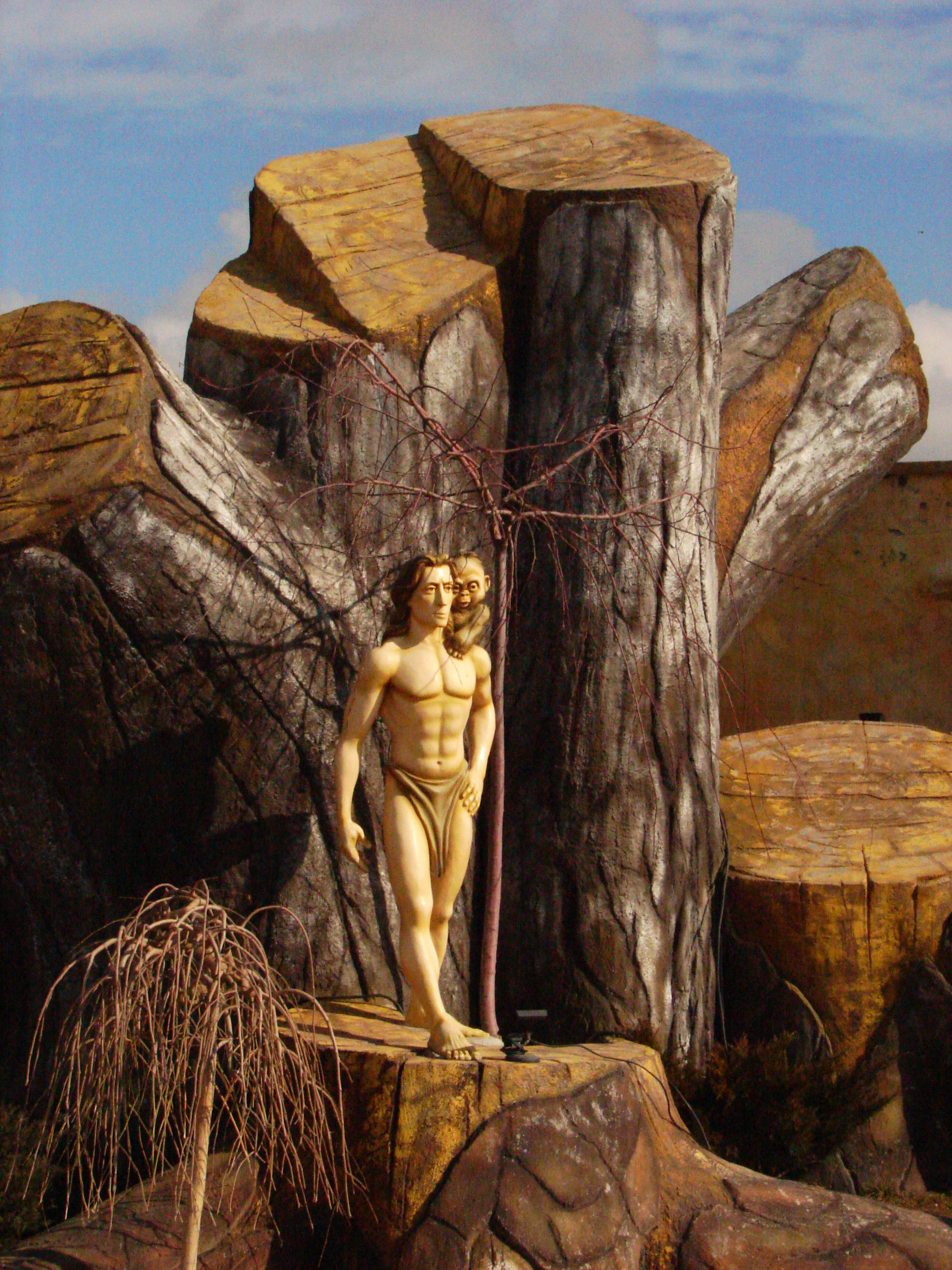 Ankara Amusement Park